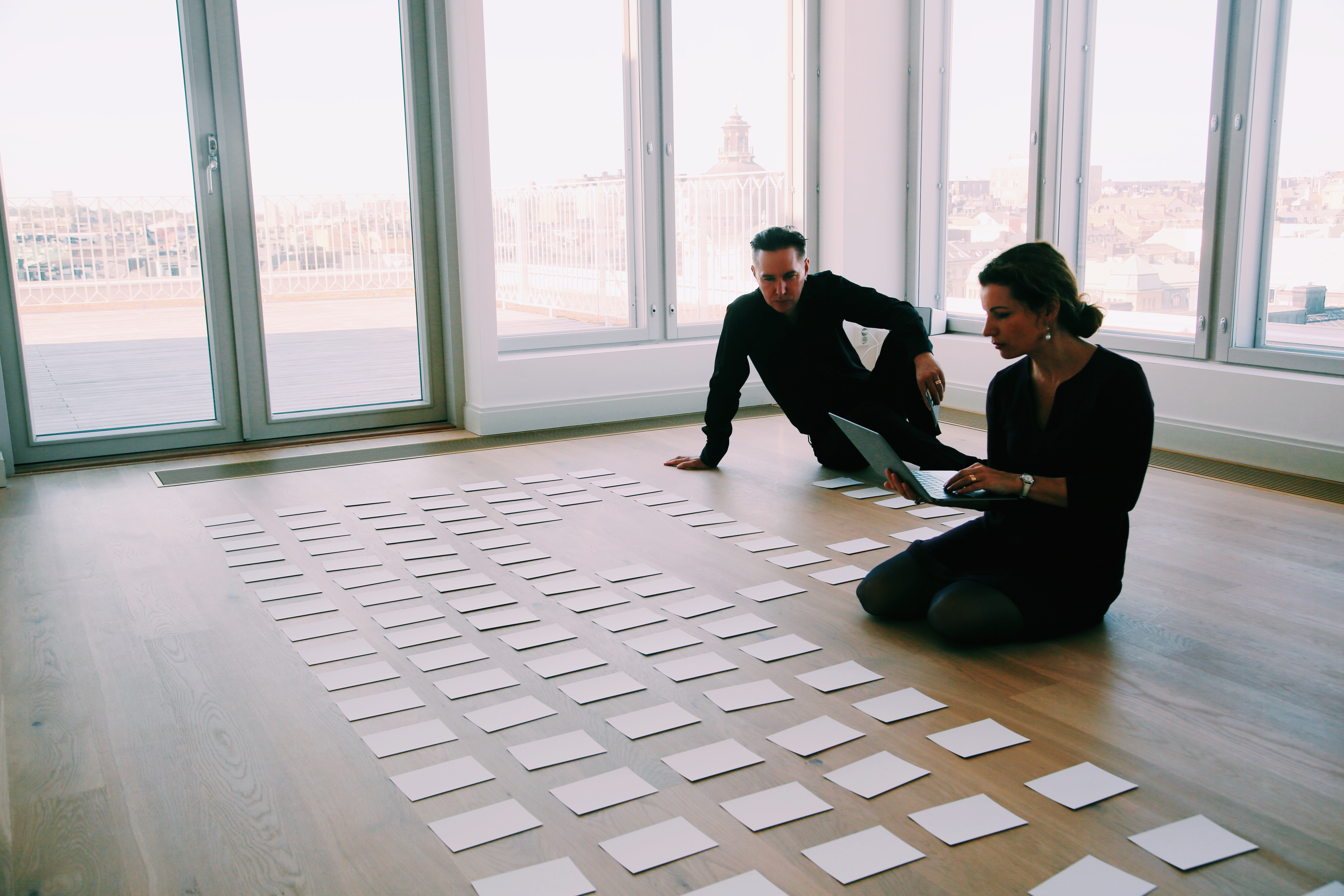 Lars Kepler gör research